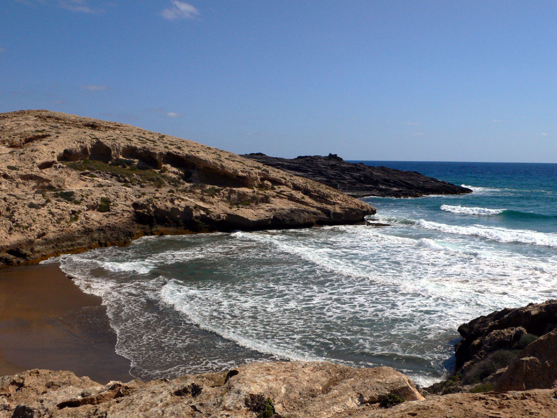 Cala Dorada en el Parque Natural de Calbanque (Cartagena, España).